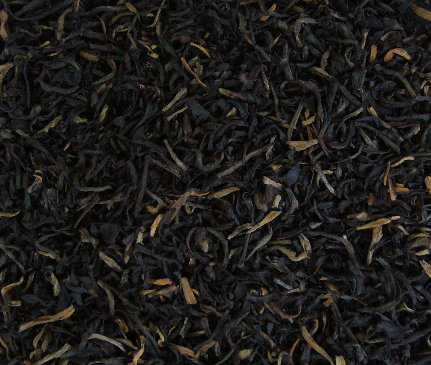 Losse Assam thee